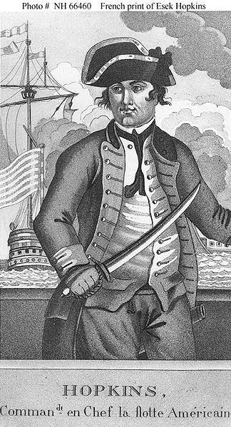 Ritratto di Esek Hopkins